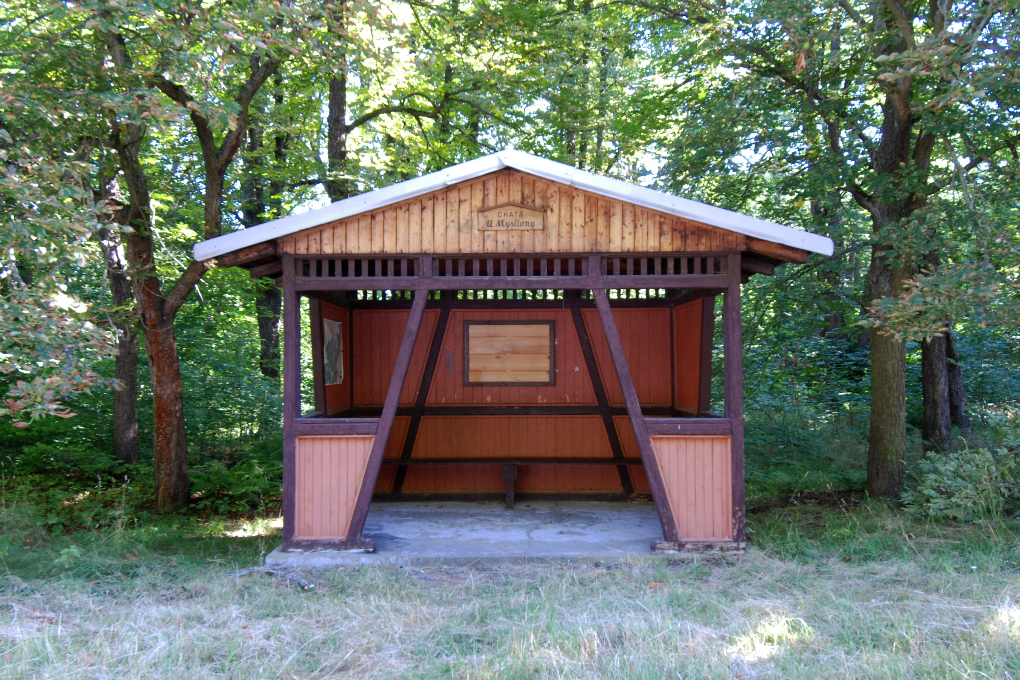 Chata U Myslivny v karlovarských lázeňských lesích poblíž Sovovy stezky u parkoviště Myslivny